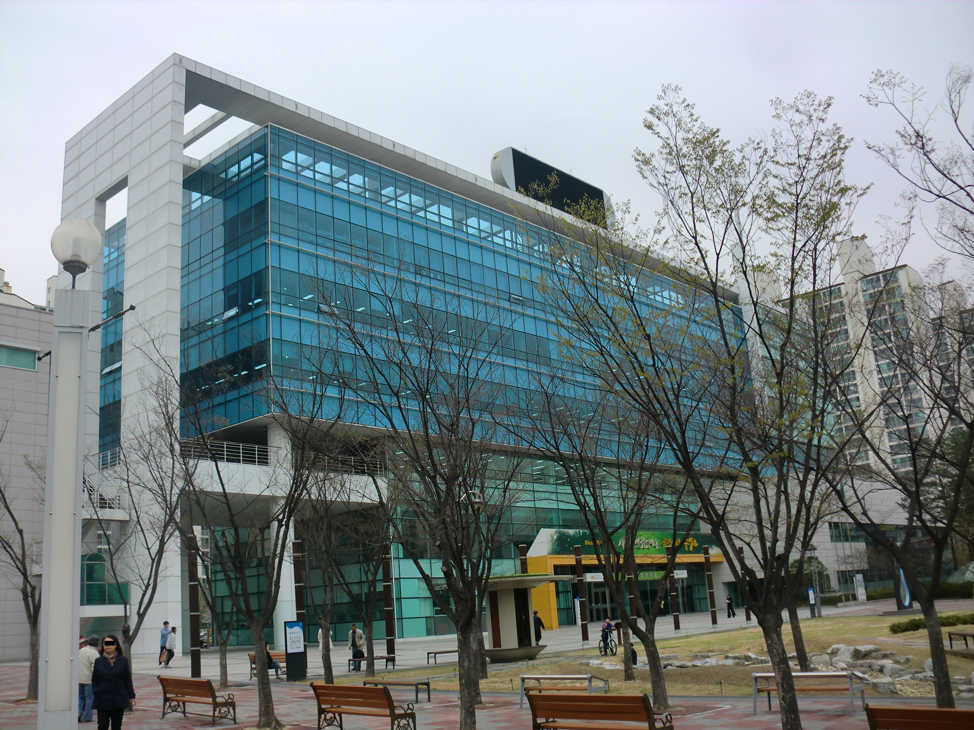 경기도 수원시에 있는 장안구청